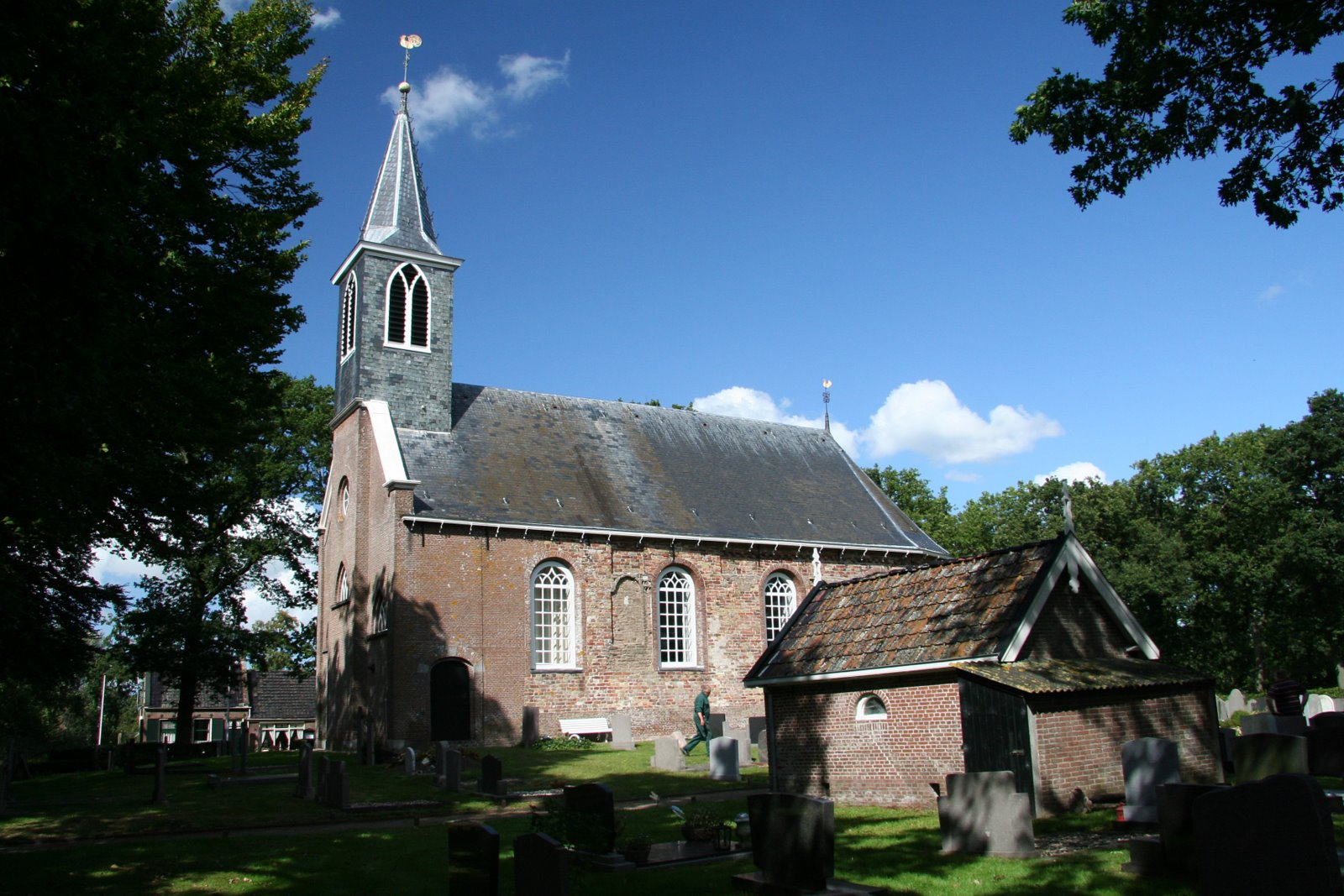 Kerkje Giekerk